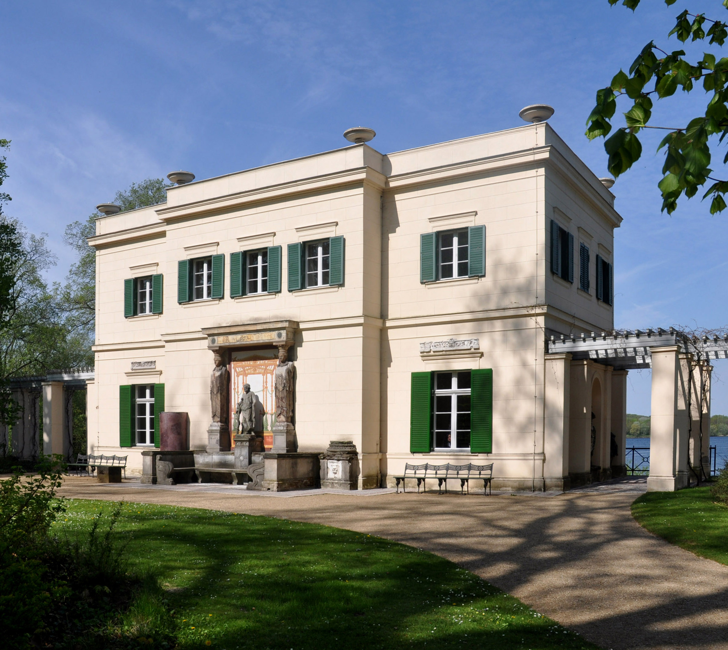 Die Ostseite des Casinos